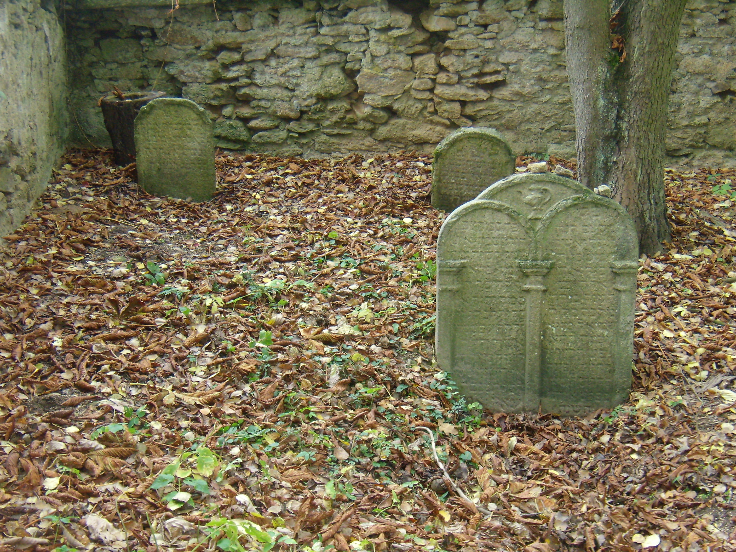 Stráž u Tachova 02 ŽH